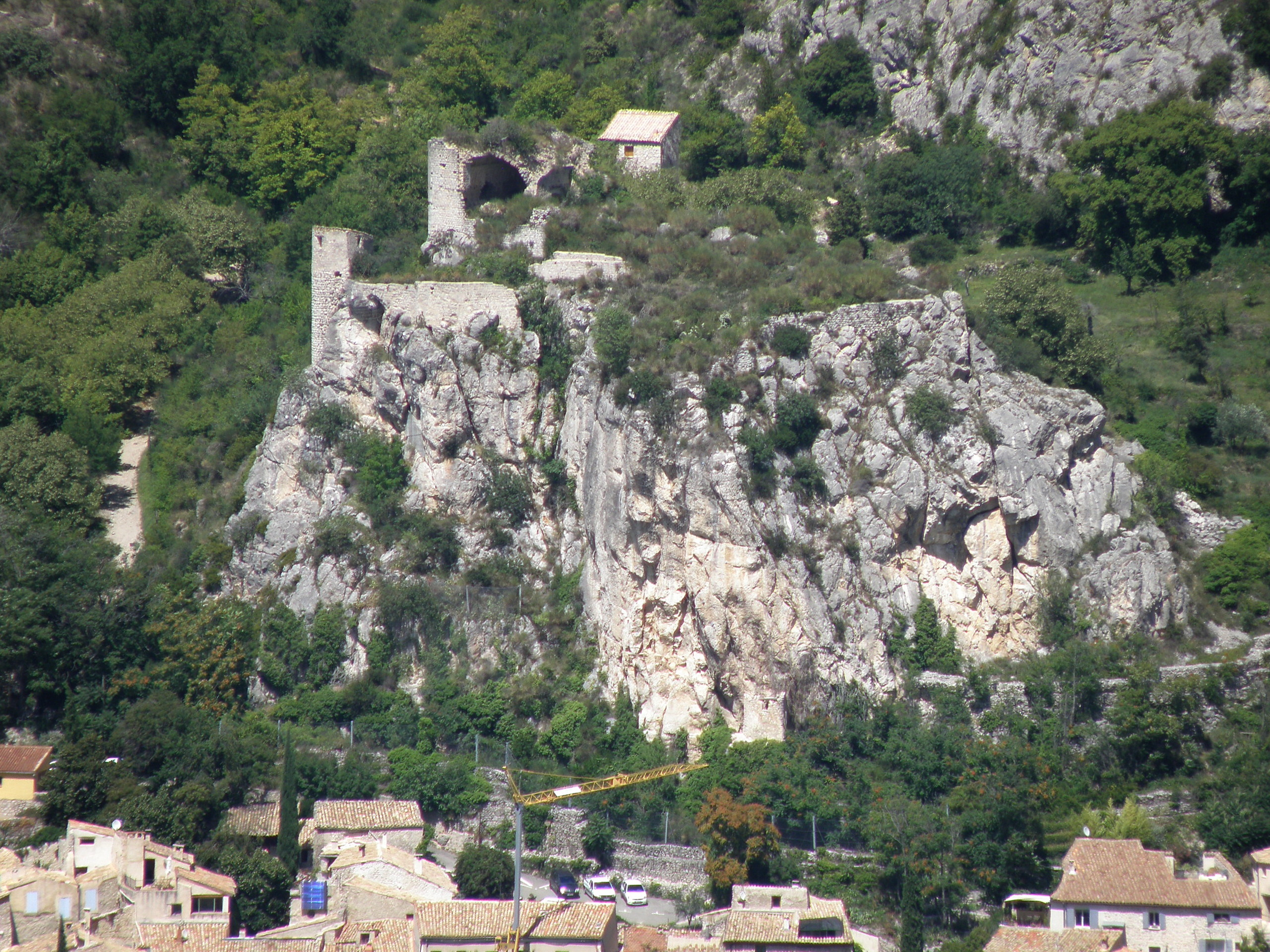 La Roche-sur-le-Buis (Drôme, France). Château.